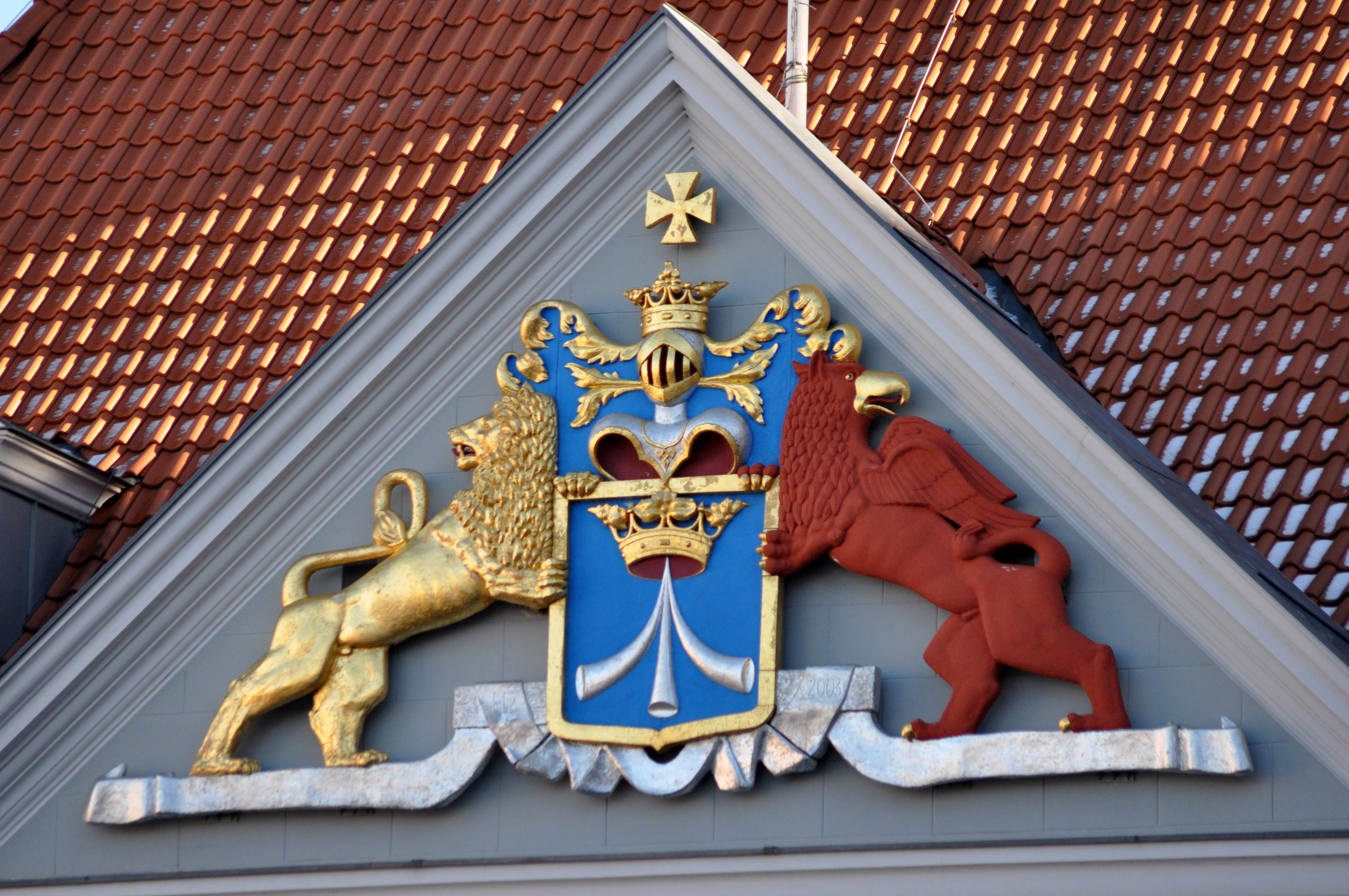 Detail am Commandantenhus in Stralsund. Dargestellt ist das Stralsunder Wappen mit Krone, gehalten vom schwedischen Löwen und dem pommerschen Greif.